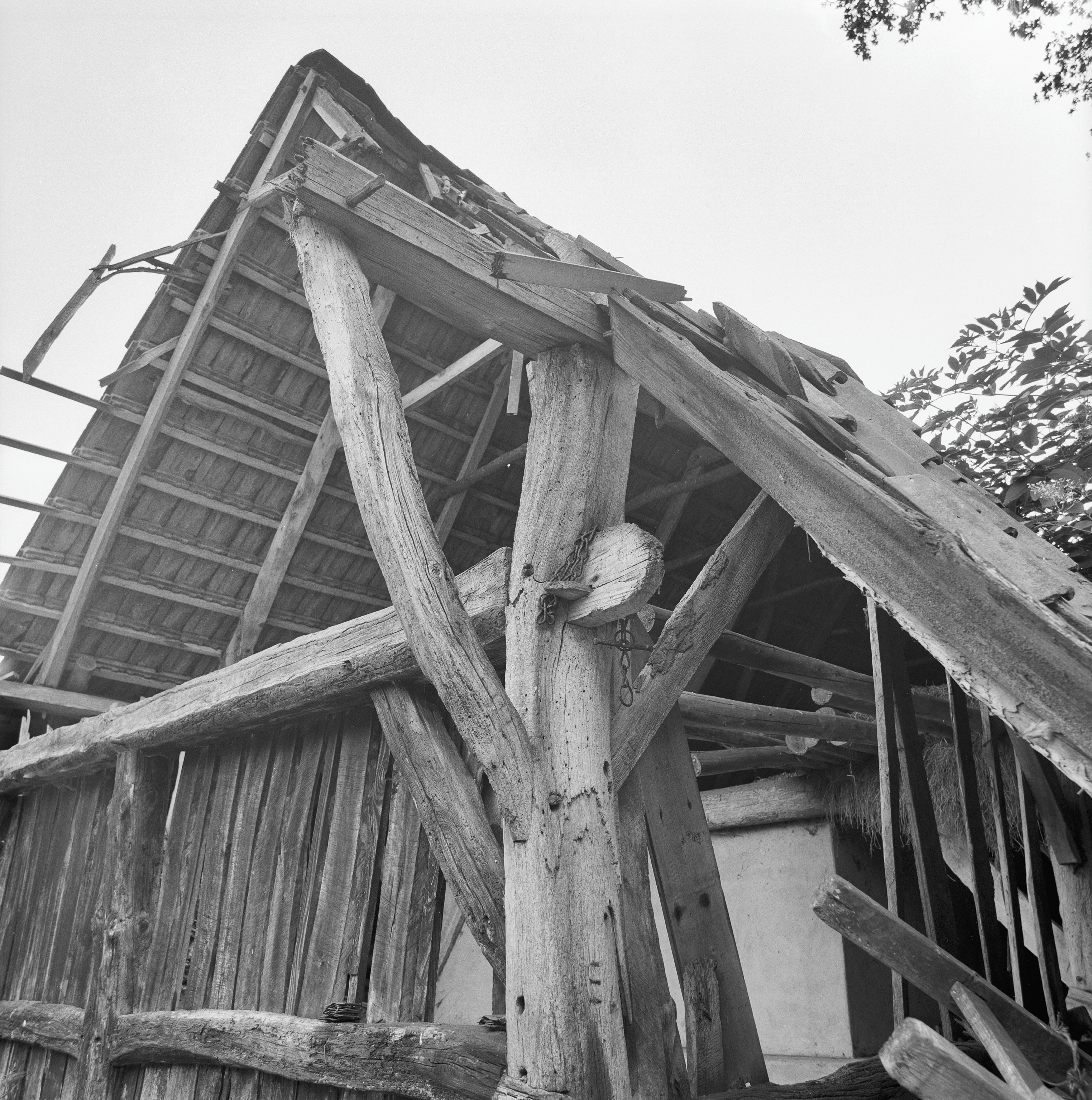 ingestort gedeelte schuur